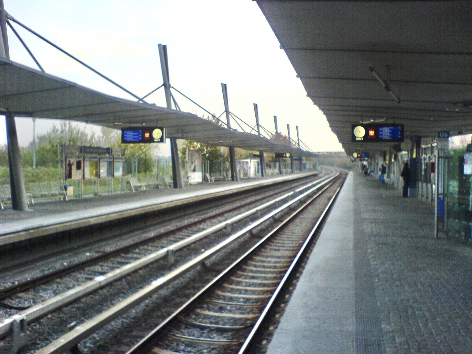 Bahnsteige des U-Bahnhofes Garching-Hochbrück (Oberbayern), Ansicht Richtung München.